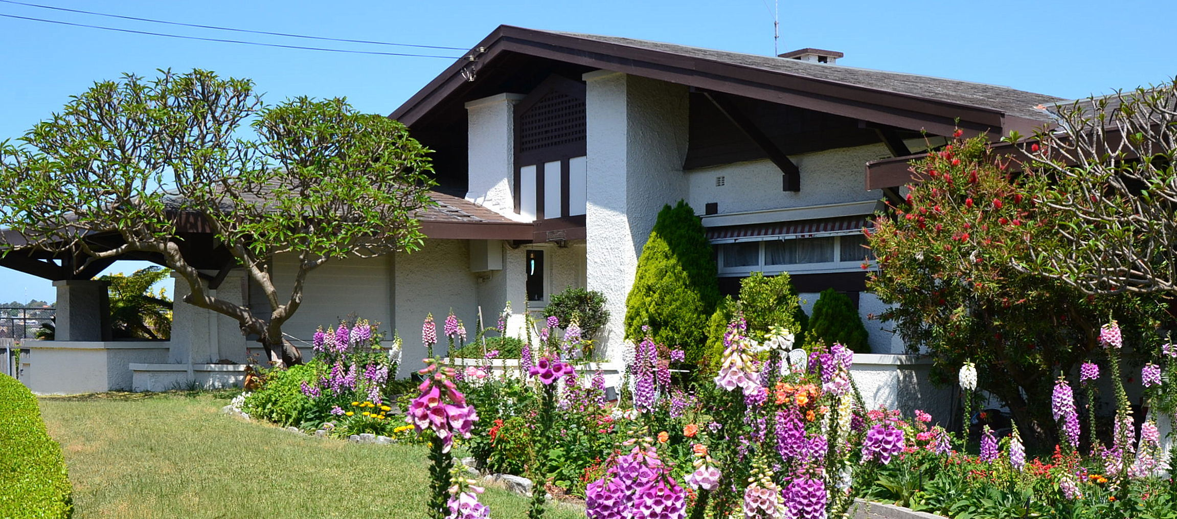 Belvedere, Cremorne, Sydney